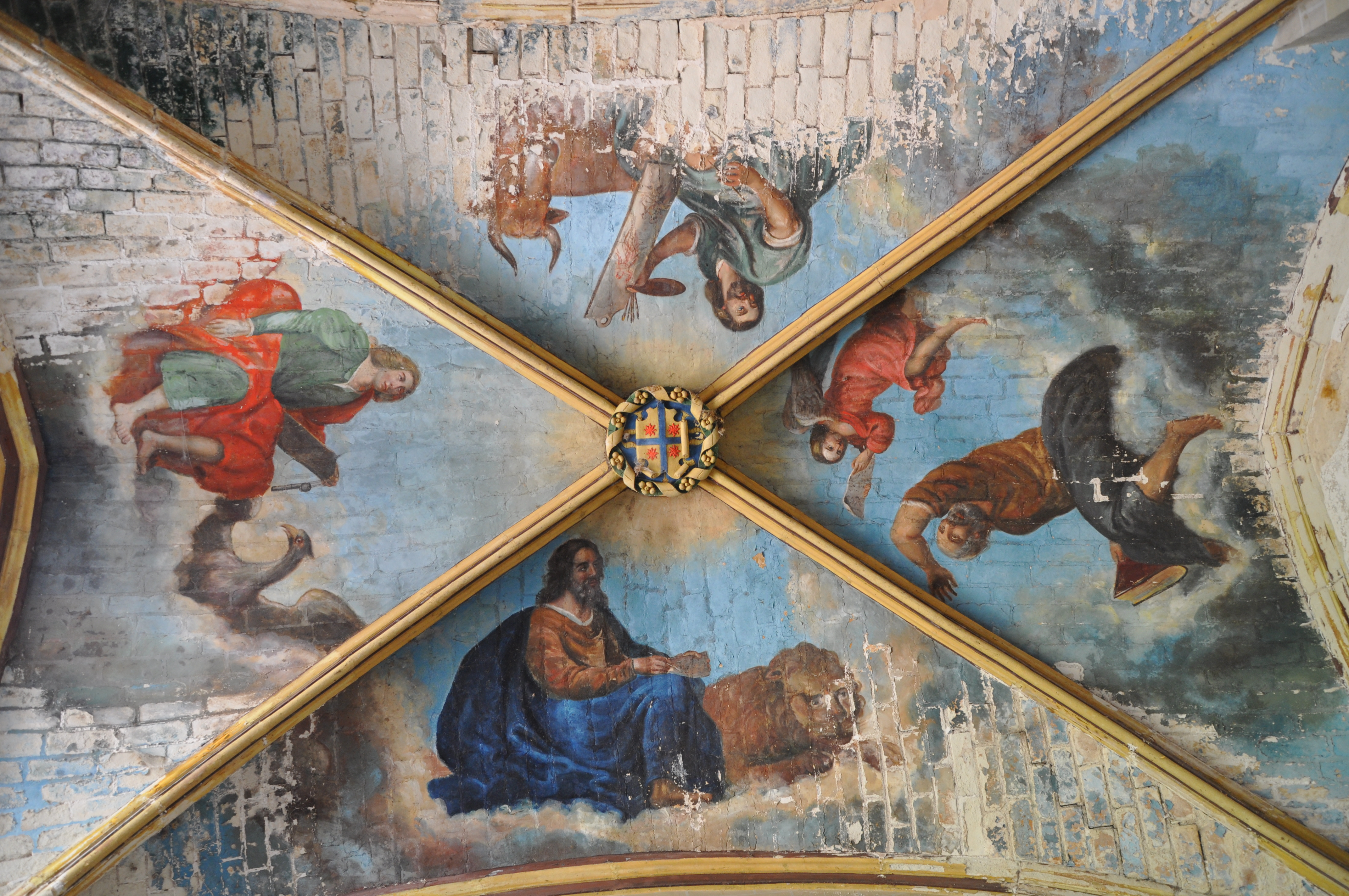 Chapelle du château de Saint-Denis-sur-Loire